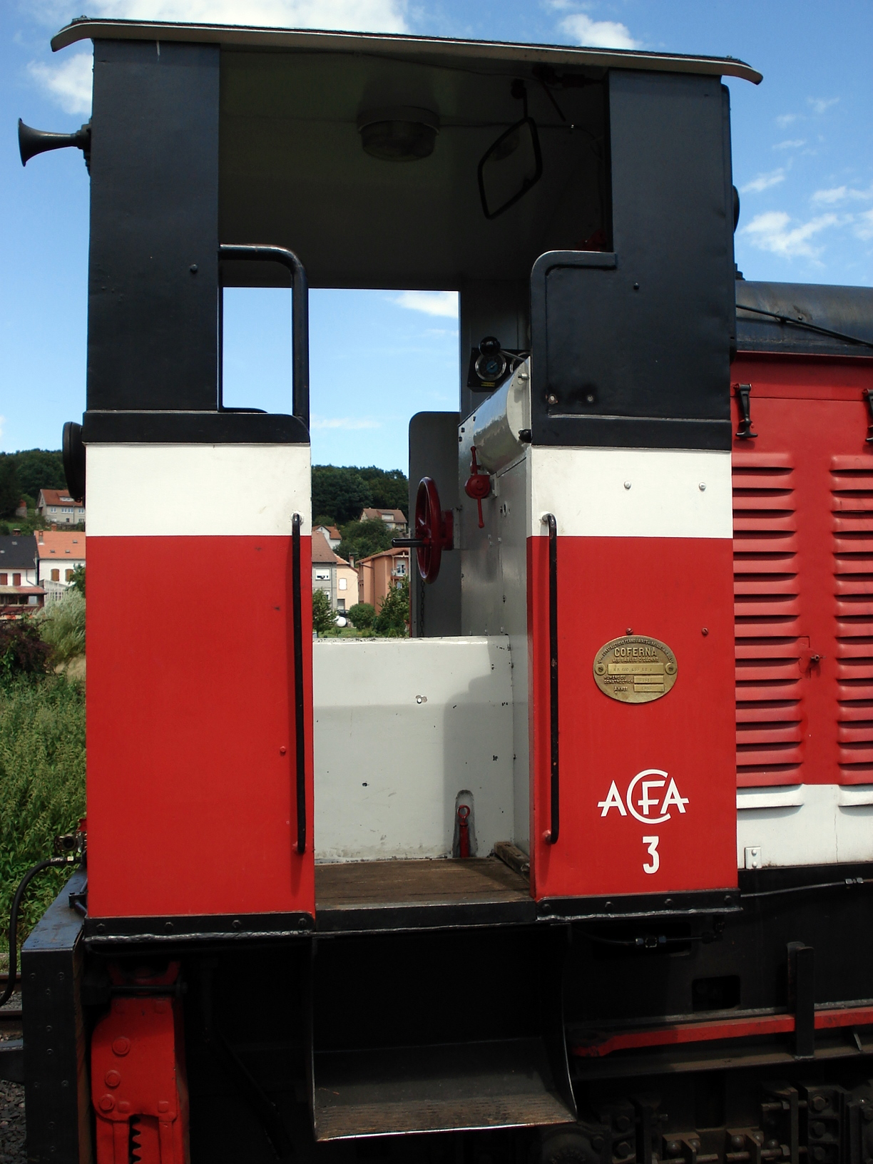 Abreschviller, comm. du dép. de la Moselle, France (région Lorraine). Train touristique (ancien chemin de fer forestier). Locomotive diésel Coferna de 1953. L'acronyme ACFA signifie : Association du Chemin de Fer Forestier d'Abreschviller.